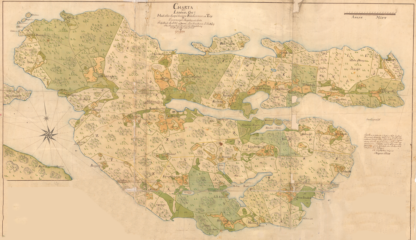 Karta över Lidingö, ursprungligen upprättad 1720 och därefter uppdaterad 1774 efter genomförd skogdelning den 29 augusti 1774 mellan Lidingös 25 frälsehemman.